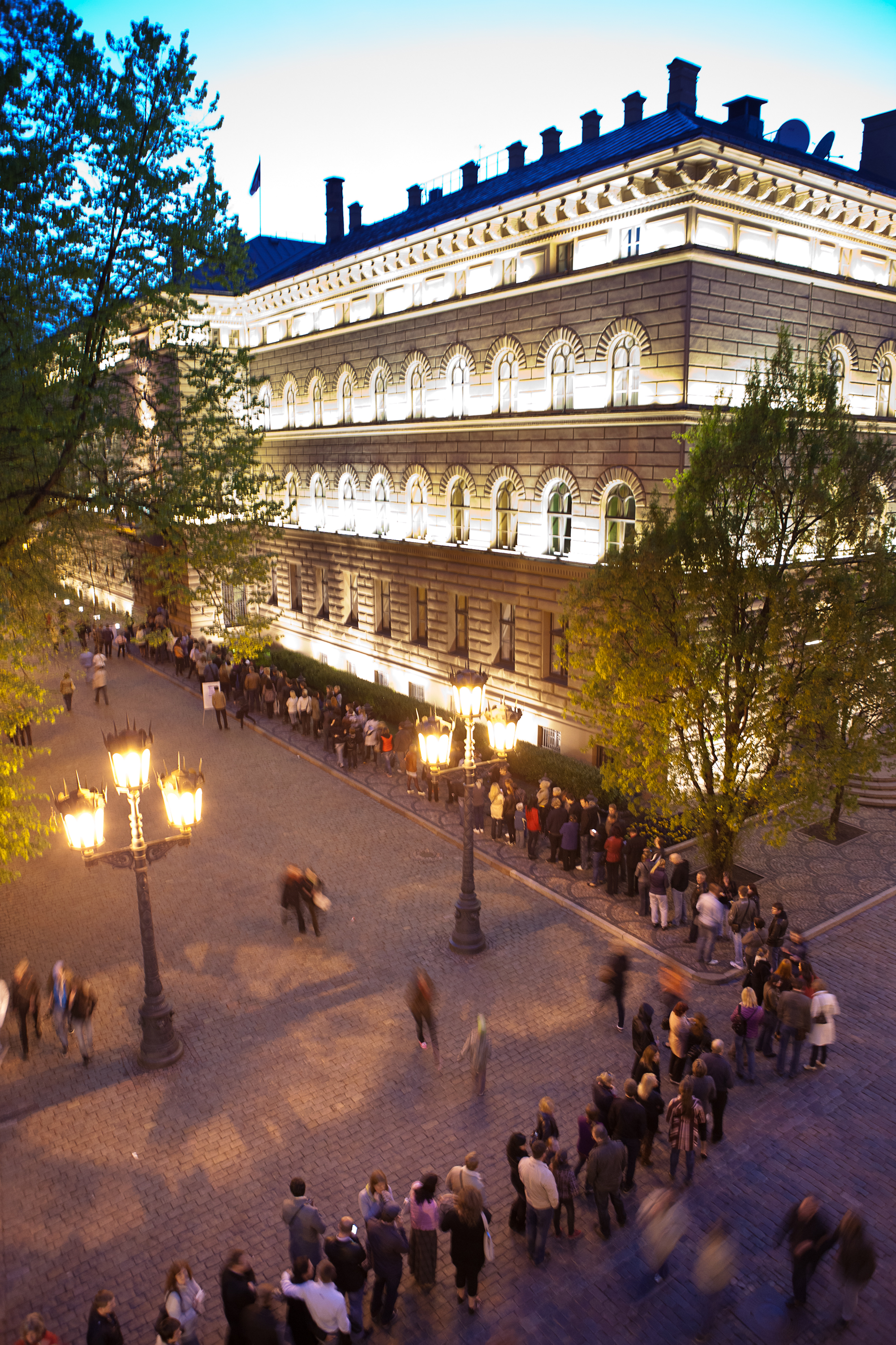 2011.gada 14.maijs. Muzeju naktī Saeima bija viens no apmeklētākajiem objektiem. Parlamentu apmeklēja gandrīz 4000 interesentu. Foto: Saeima